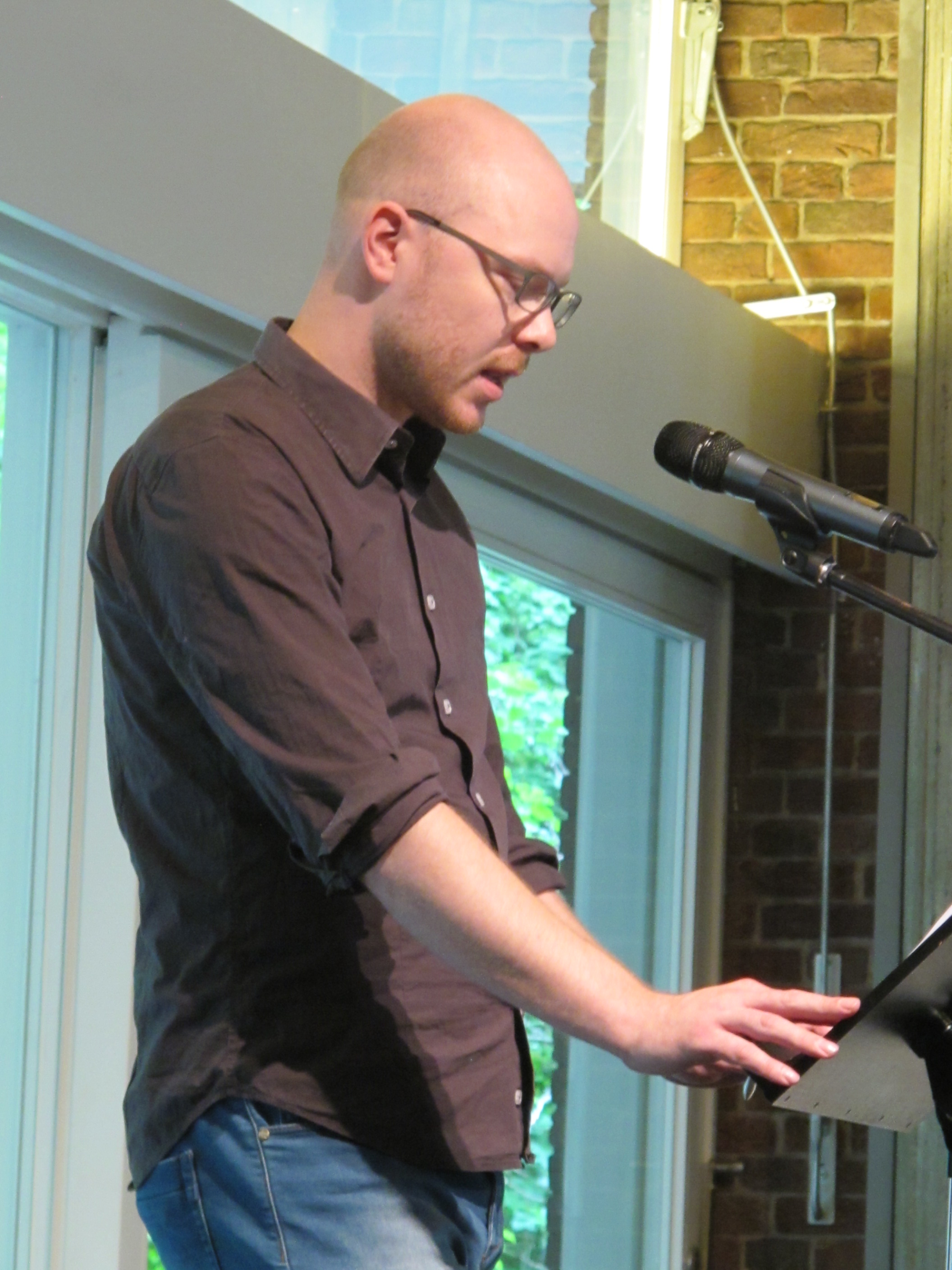 Christoph Wenzel liest auf dem Lyrikmarkt Berlin 2015